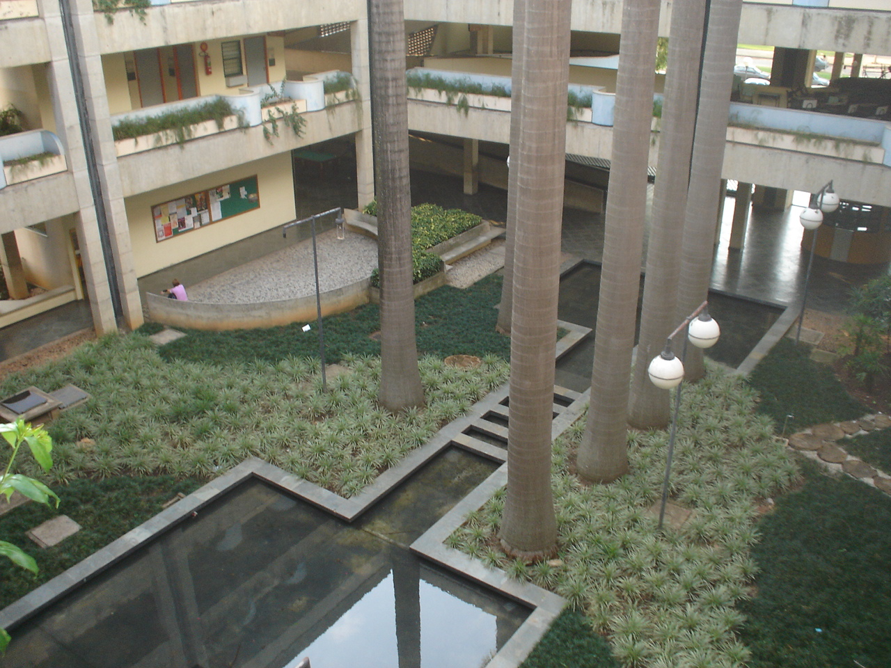 Interior da ECI-UFMG.